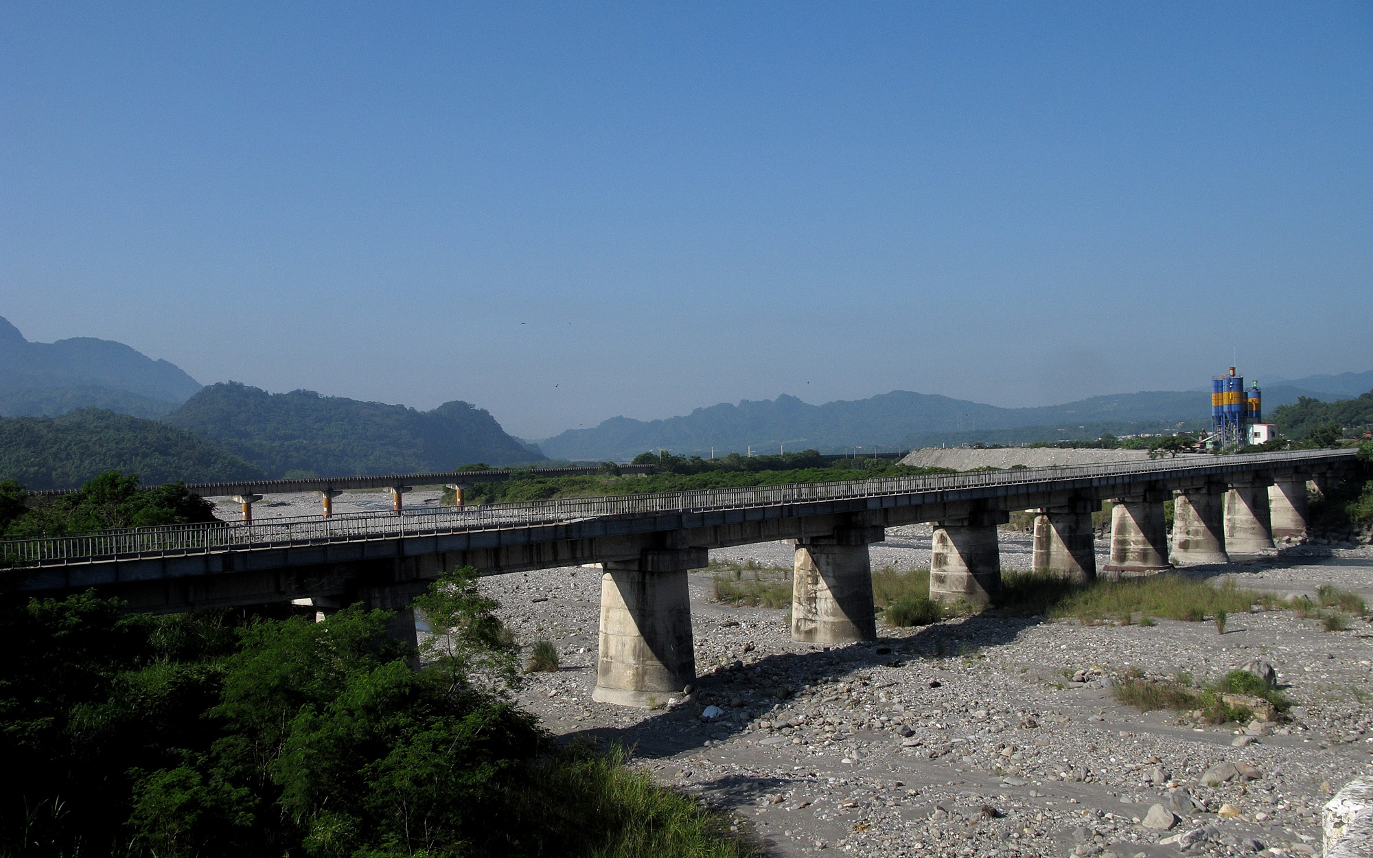 鹿野溪鐵橋